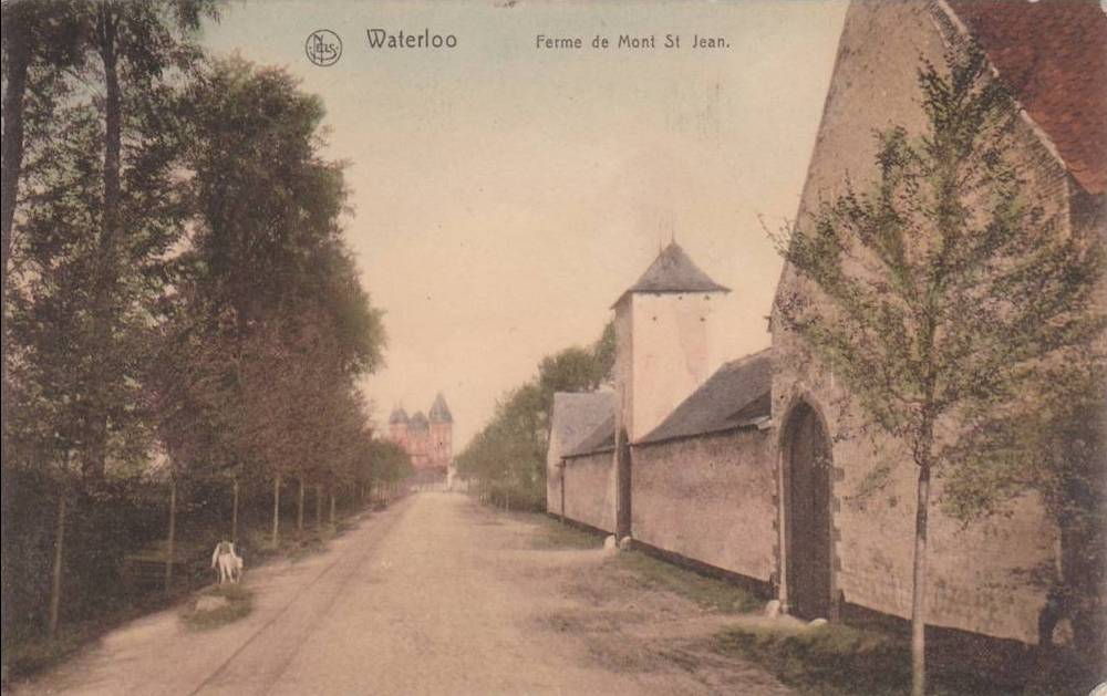 La ferme de Mont-Saint-Jean et le château de l'industriel Français Léon Cheval (producteur d'engrais chimique). Le long de la N5 à Waterloo, Belgique.